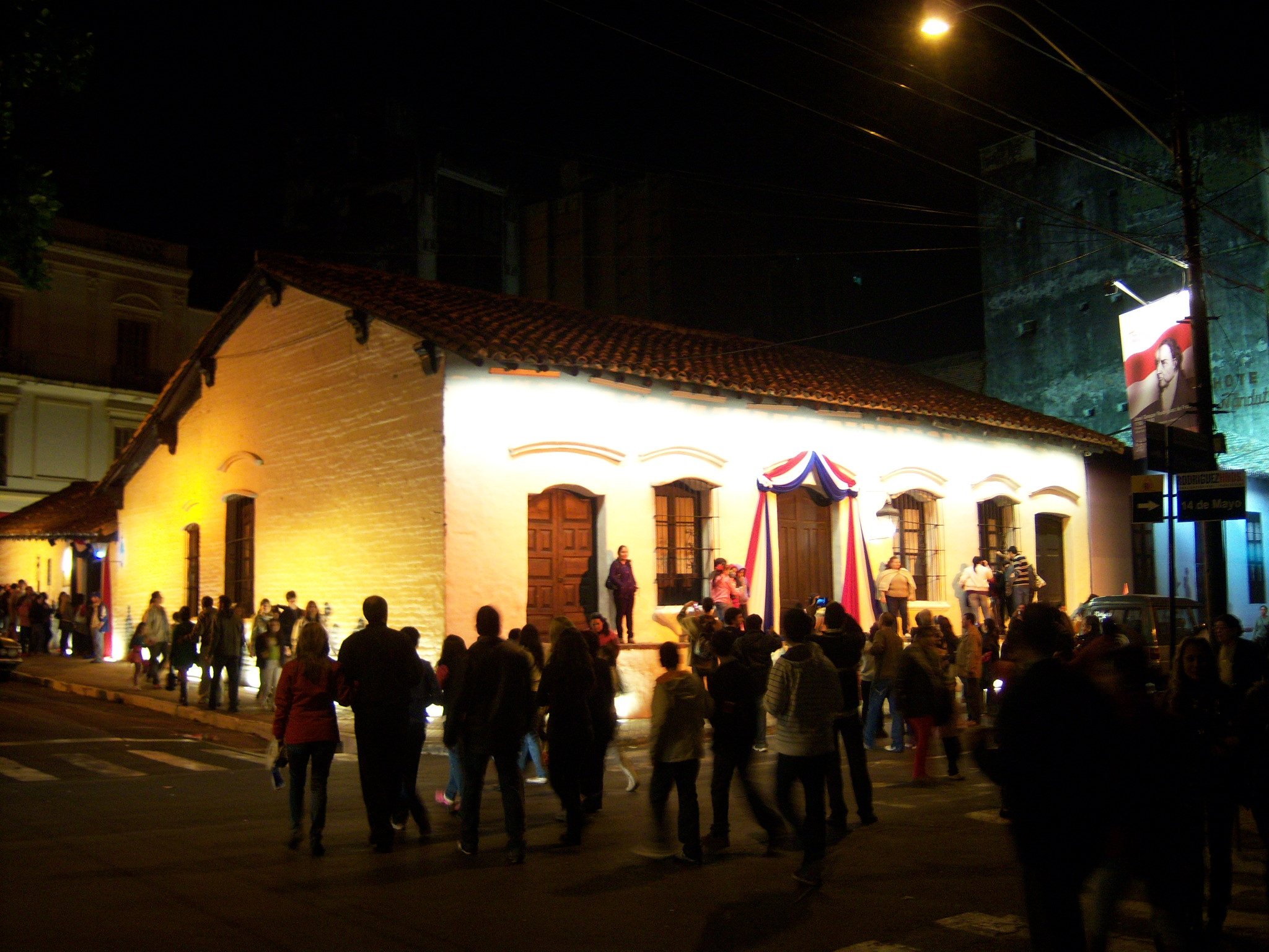 Festejos centrales del Bicentenario.